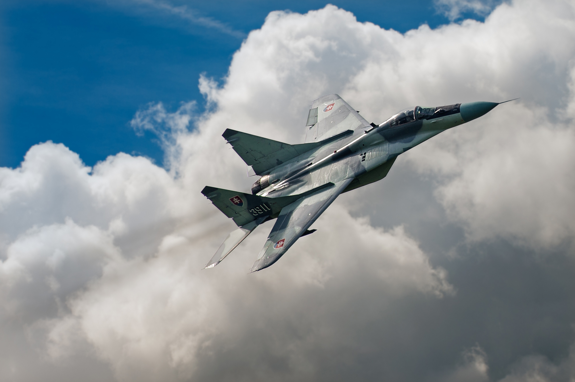 Eine slovakische MIG-29 bei der Air Show in Florennes, Belgien.